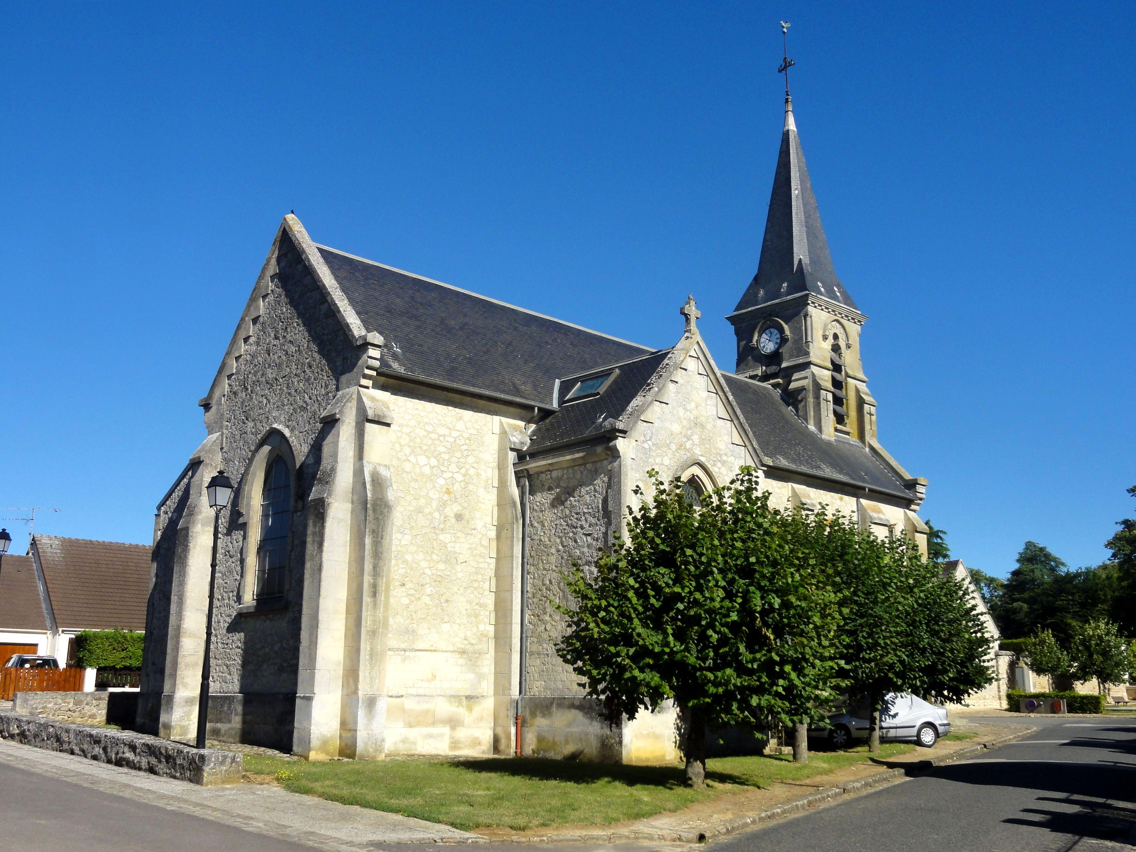 Vue depuis le sud-est.